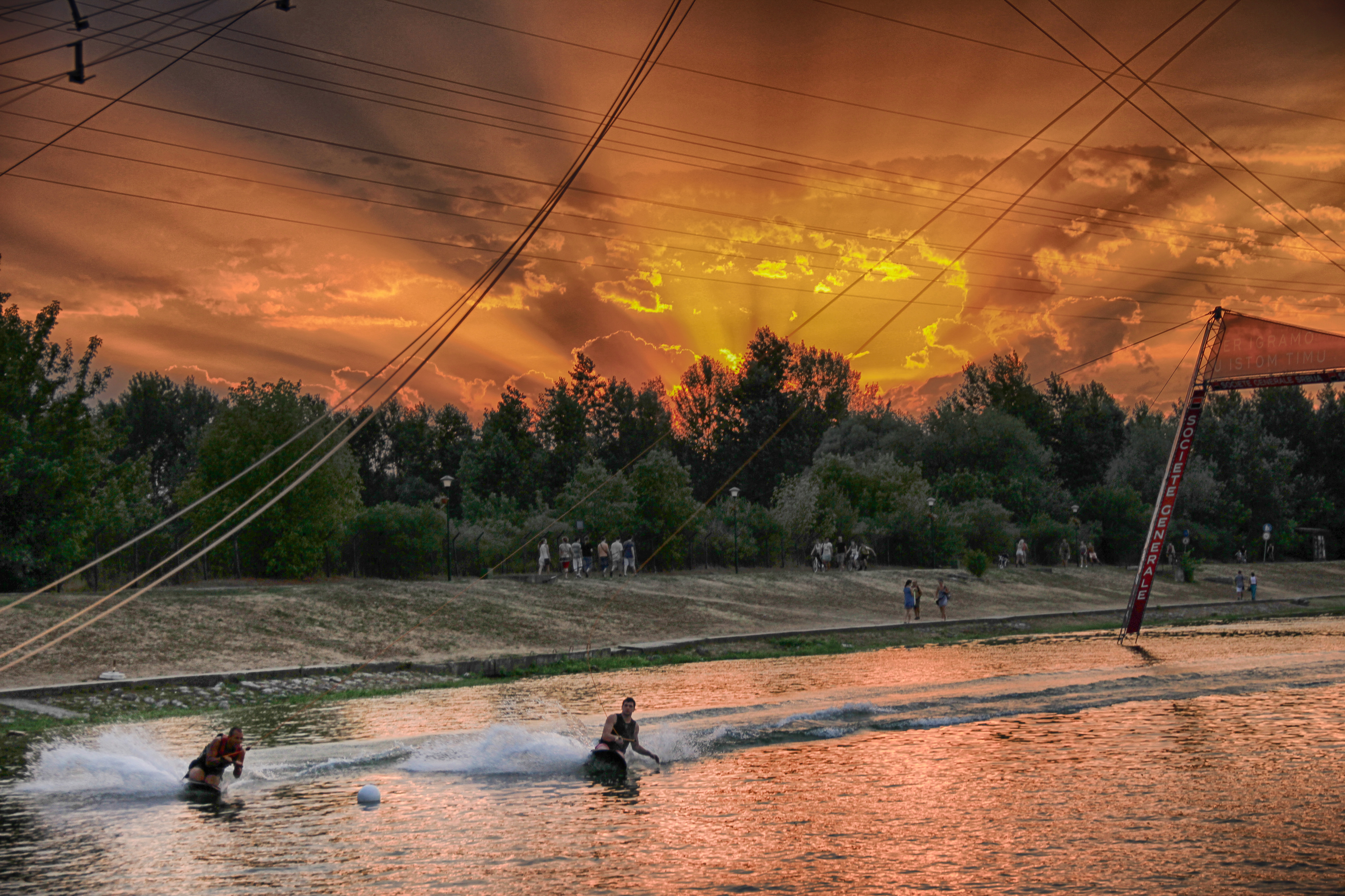 Taken on 12.7.2012.